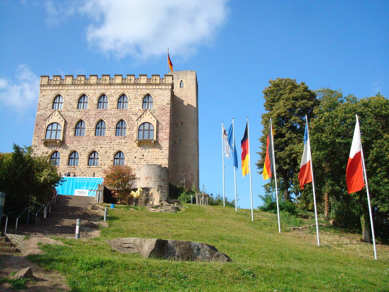 Hambacher Schloss mit Fahnen von Osten aus.